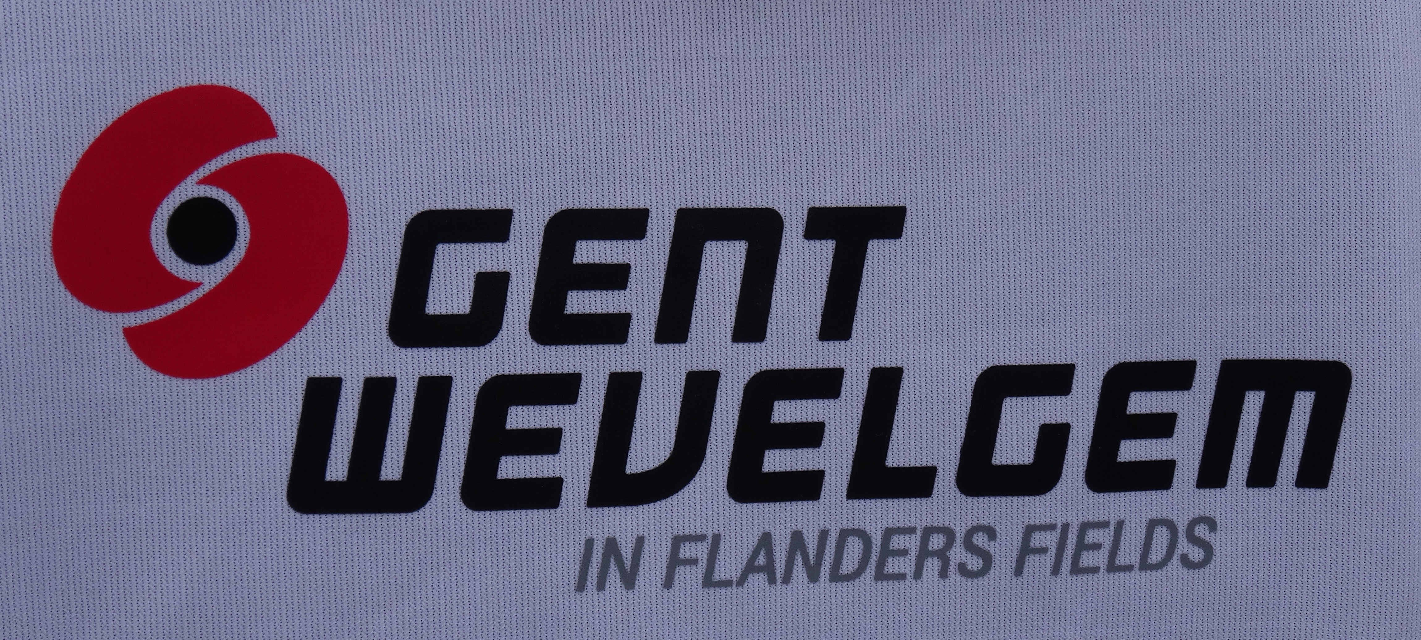 Reportage photographique réalisé le dimanche 30 mars à l'occasion de l'arrivée de Gand-Wevelgem 2014 à Wevelgem, Belgique.